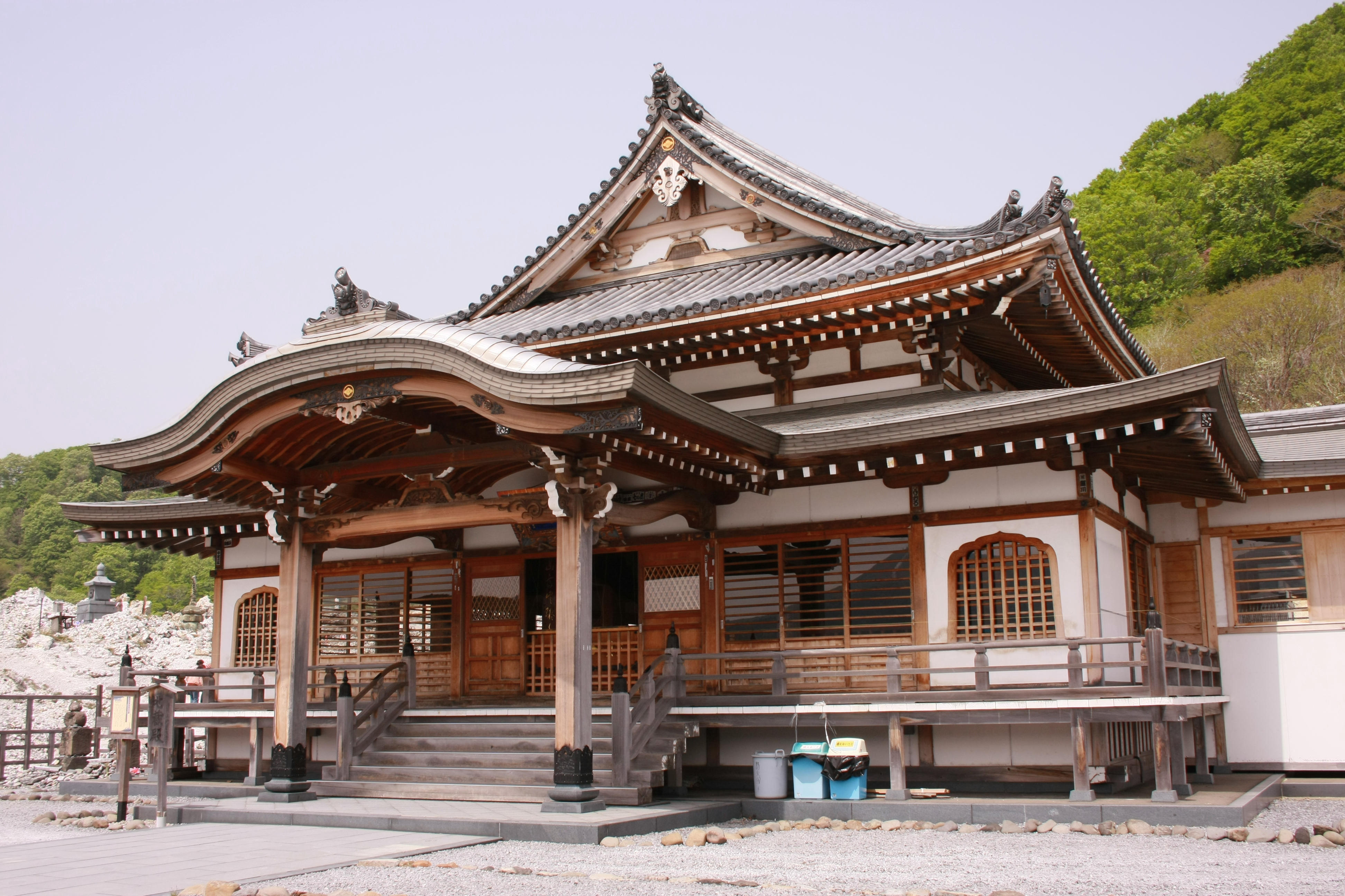 恐山菩提寺の地蔵殿